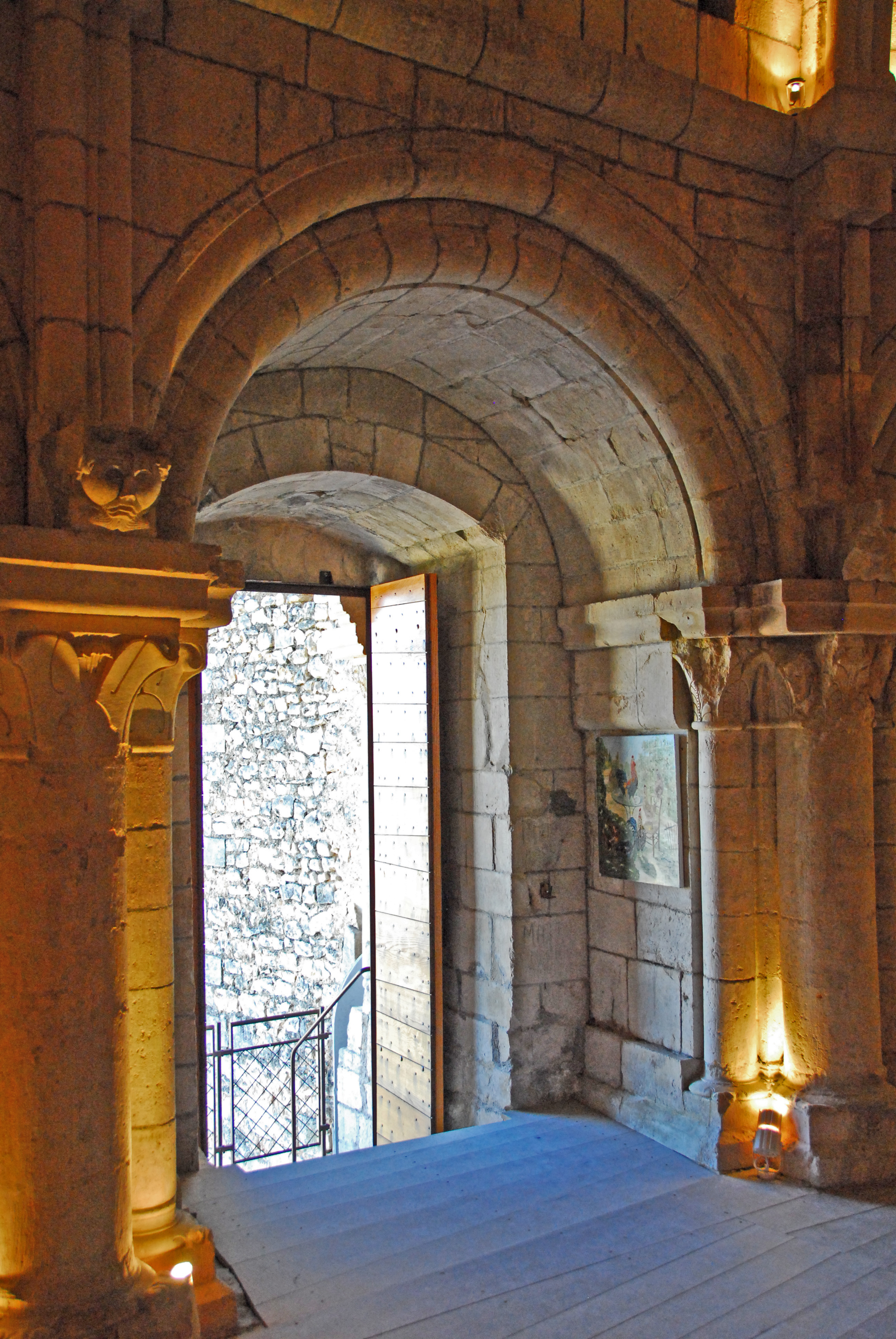 Chateau de Simiane-la-Rotonde,Hauptportal von innen